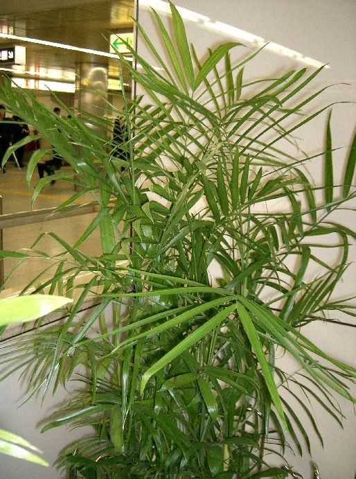 Chamaedorea seifrizii